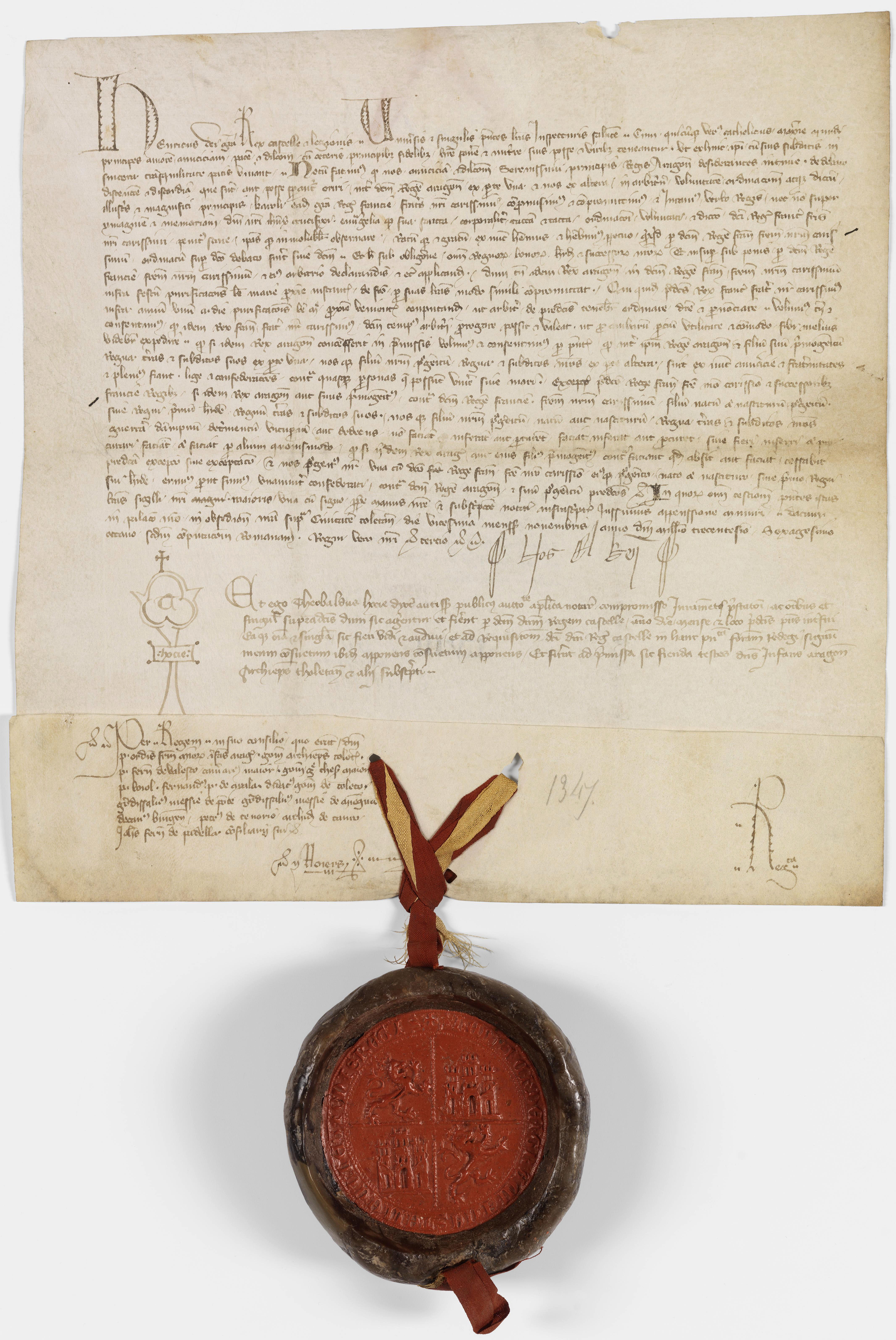 Promesse du roi de Castille et León, Henri de Trastamare, de se conformer à l’arbitrage du roi de France Charles V rendu sur son conflit avec le roi d’Aragon à Tolède en novembre 1368.